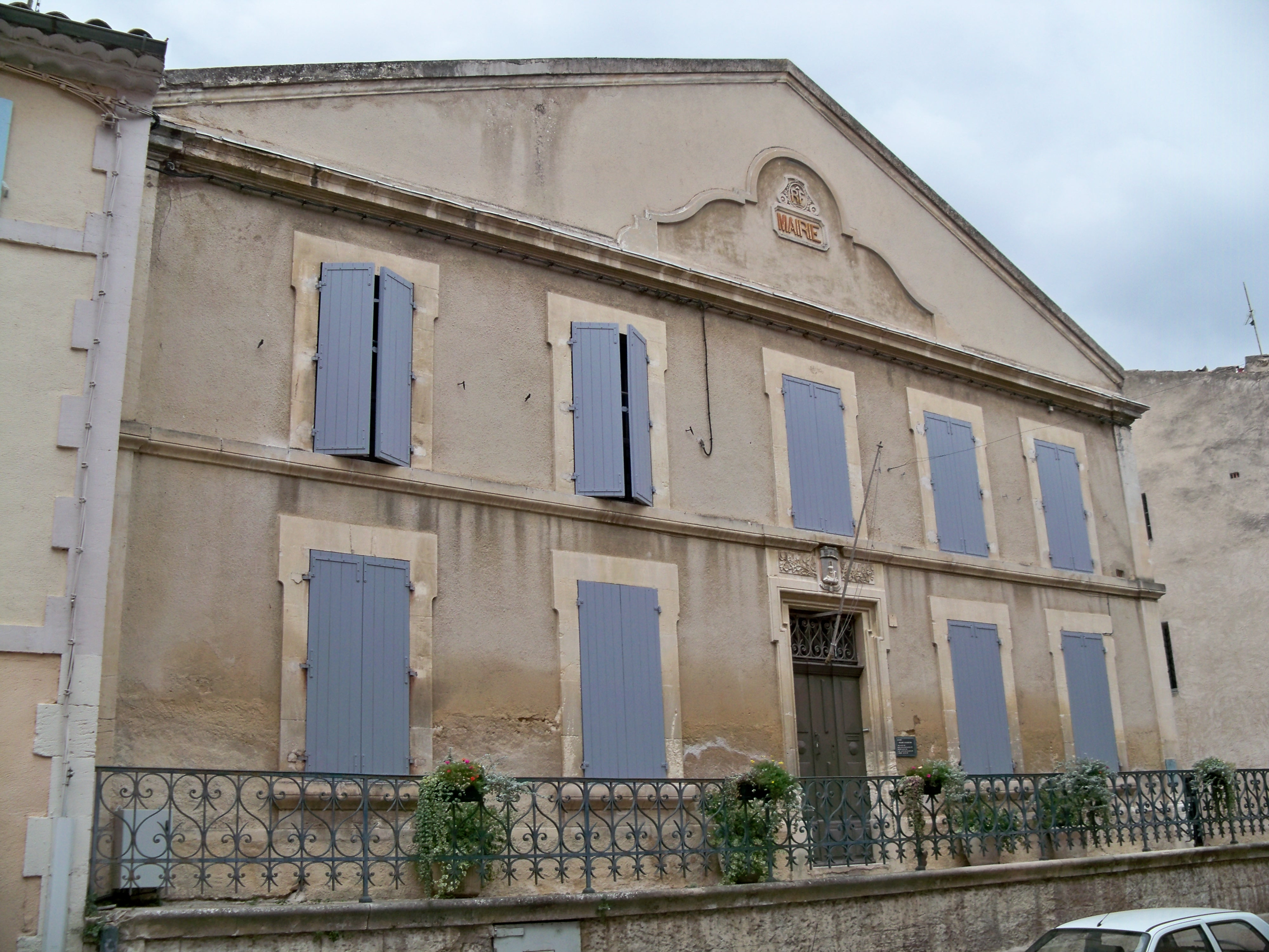 Mairie de Lourmarin (84)